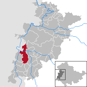 Vacha in Thuringia - Wartburgkreis